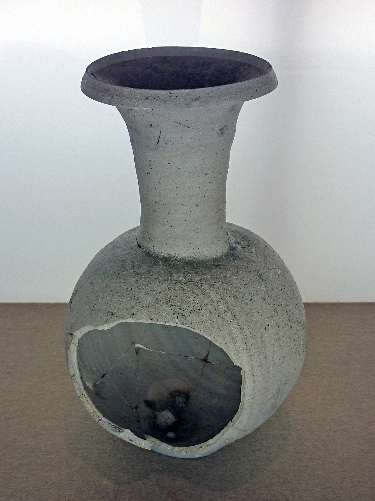 湖西窯跡群（静岡県湖西市）産の須恵器